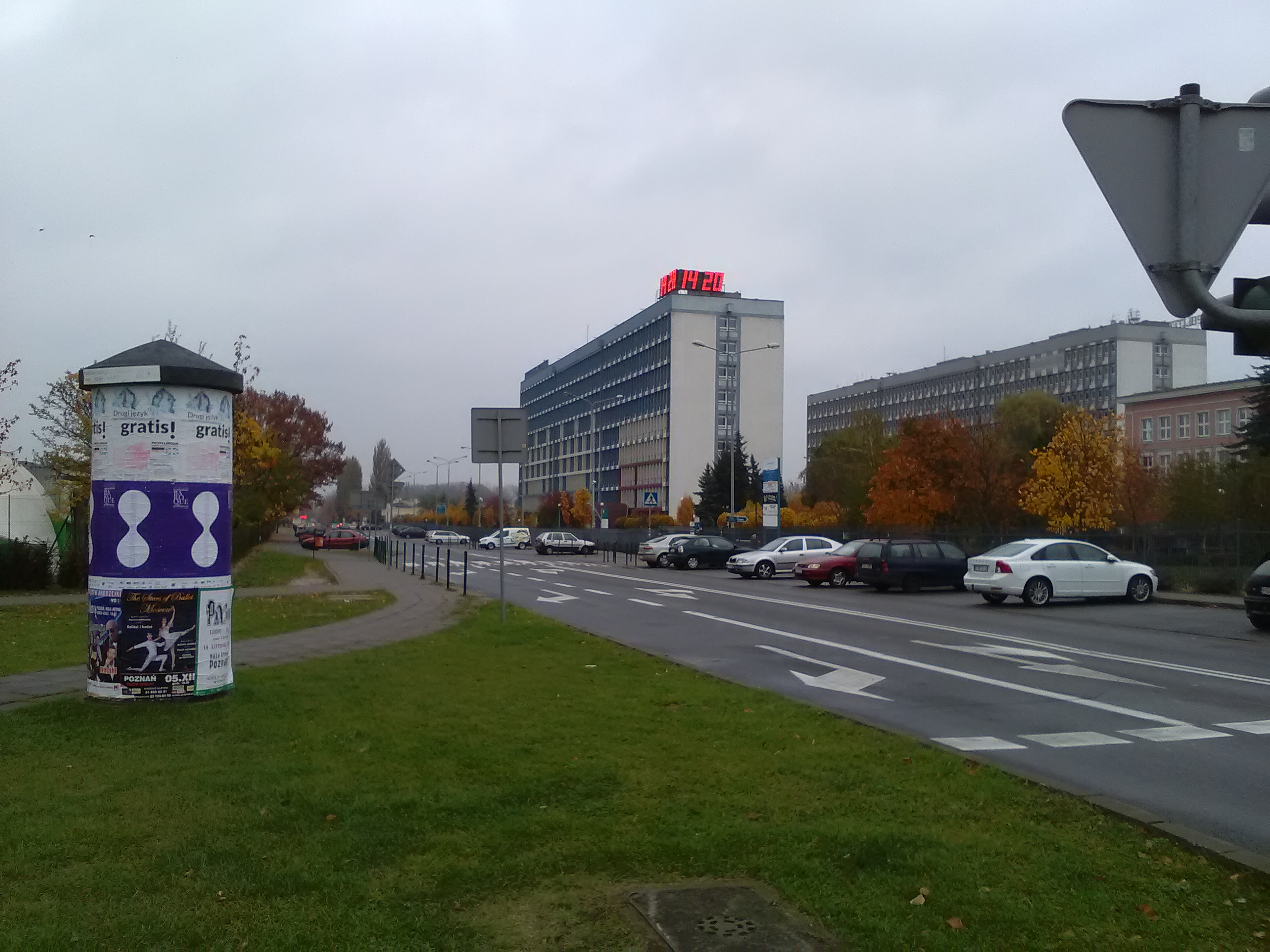 Ulica Piotrowo w Poznaniu.